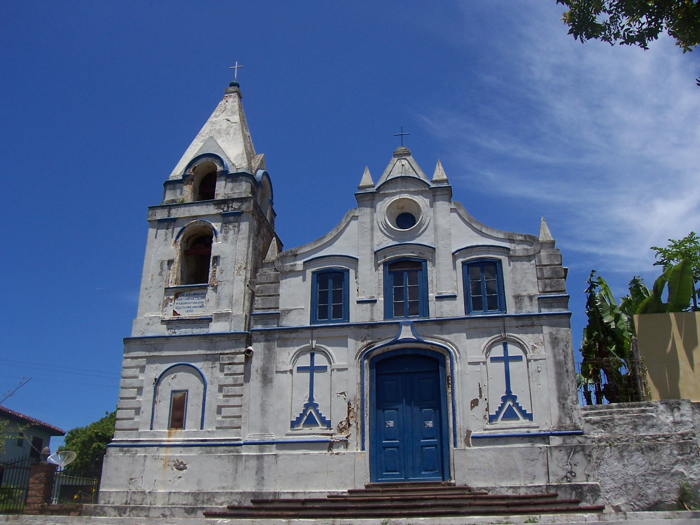 Igreja São Domingos em Torres, Rio Grande do Sul, Brasil.